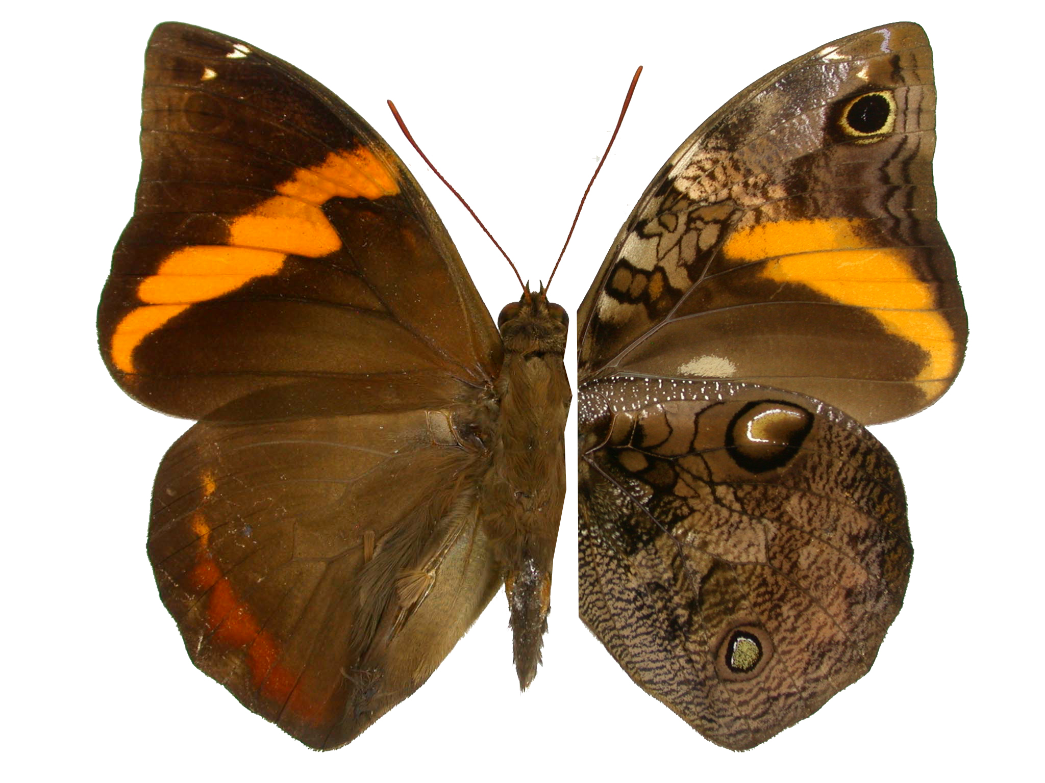 Nymphalidae Ecuador